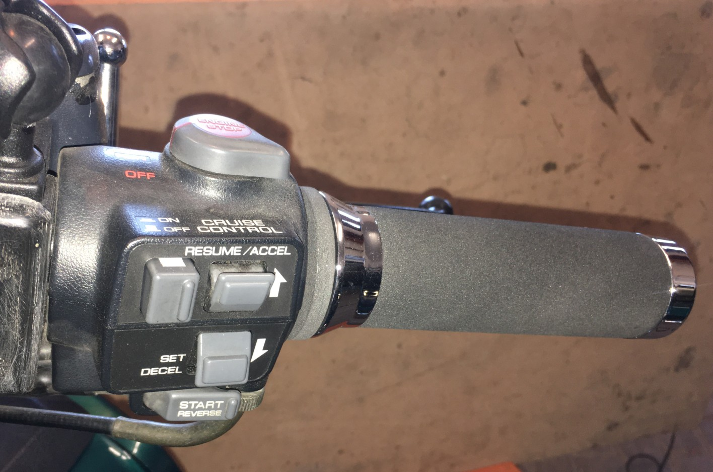 Tlačítka pro ovládání tempomatu na Hondě Gold Wing GL1500